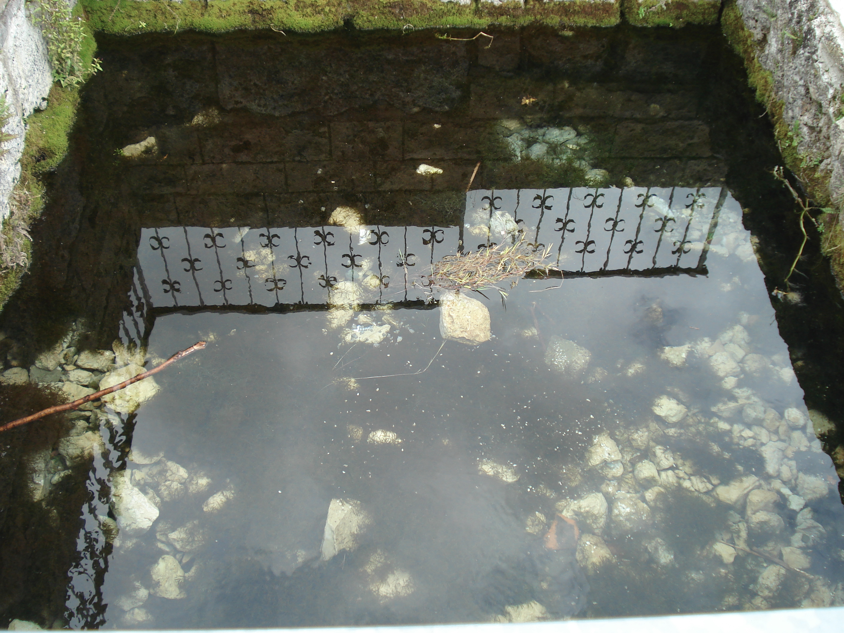 Austrittsstelle im Schmiedbachbrunnen